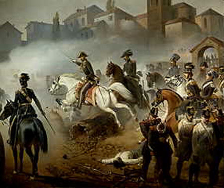 Episodio dello scontro di Sommacampagna avvenuto il 23 luglio 1848, subito prima della battaglia di Custoza, nell'ambito della prima guerra di indipendenza. Particolare del dipinto conservato ed esposto nel Museo del Risorgimento di Torino. Una diversa interpretazione del soggetto del quadro la dà il sito che, invece, collega il dipinto ad un episodio secondario della prima guerra di indipendenza, avvenuto a Sommacampagna il 30 aprile 1848, in occasione della battaglia di Pastrengo.